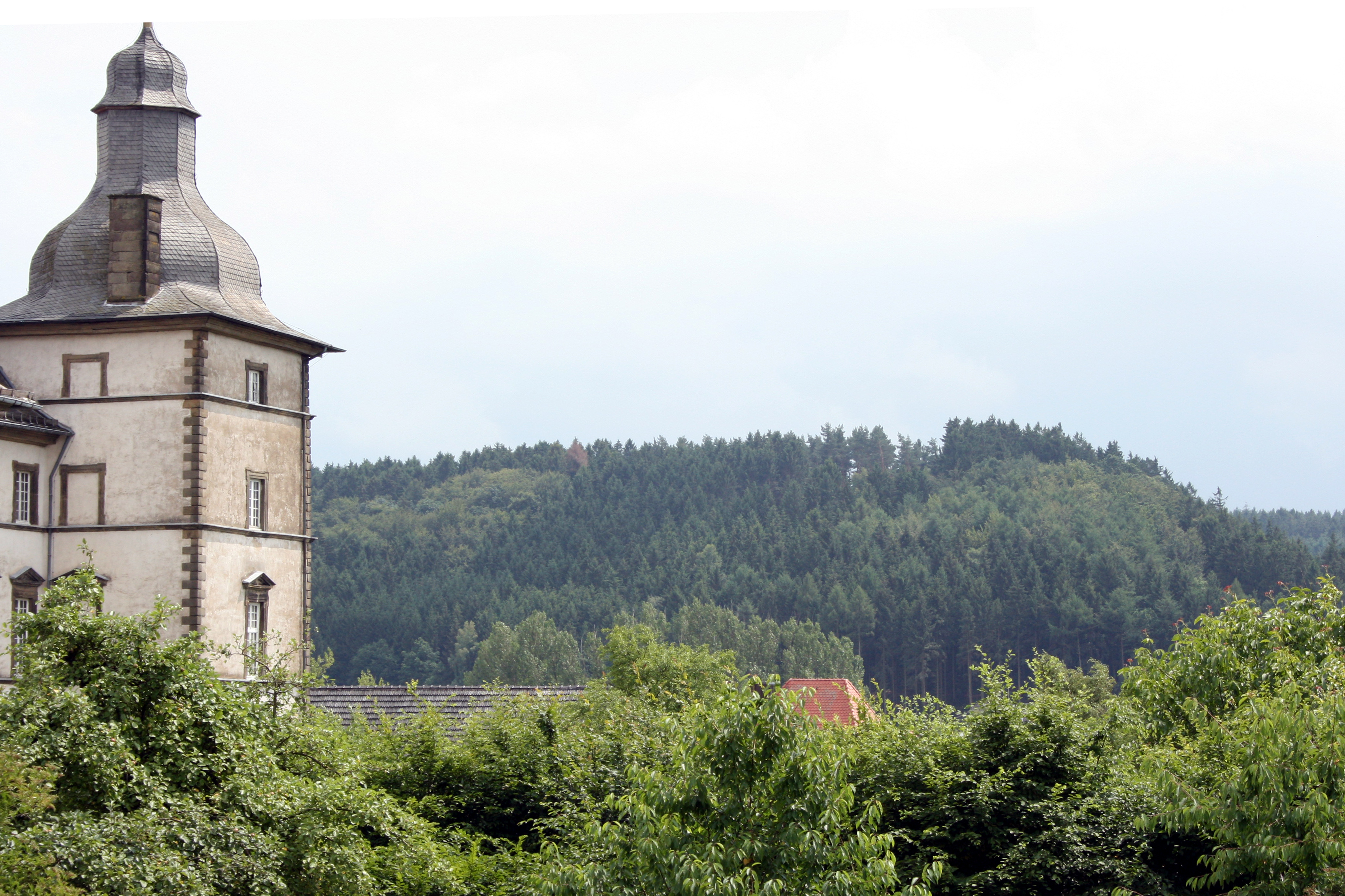 Blick auf den Hügel Loermund aus Sicht der Kommende